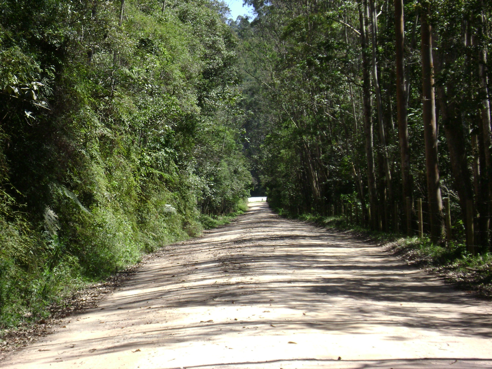 Rodovia SP-92 no bairro de Casa Grande, em Biriiba Mirim.